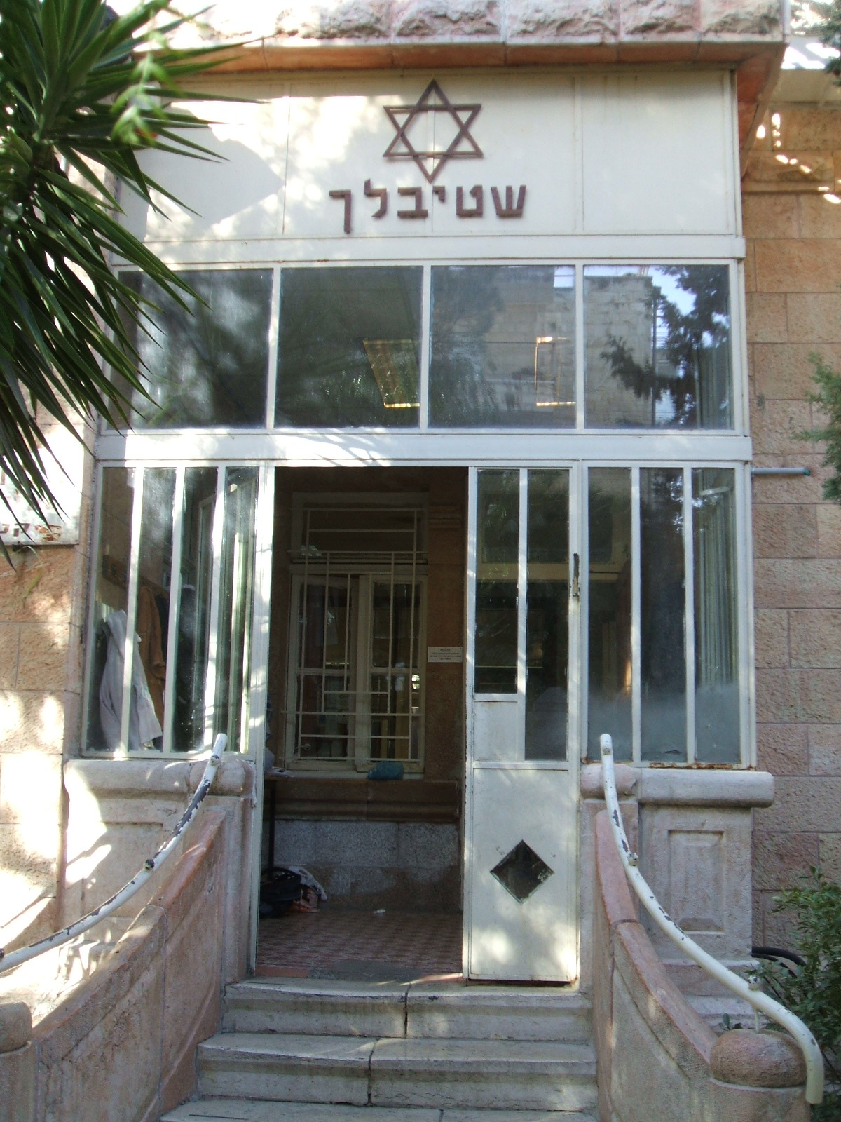 "Shtiebelekh" synagogue in Katamon, Jerusalem